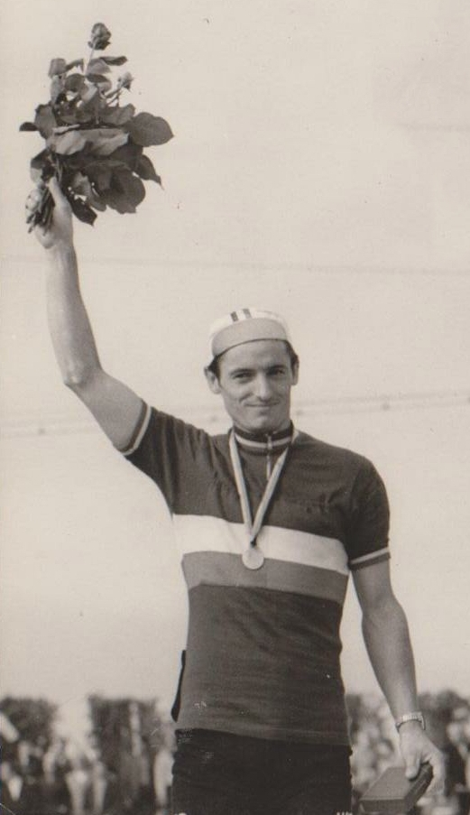 Podium Berlin 1970